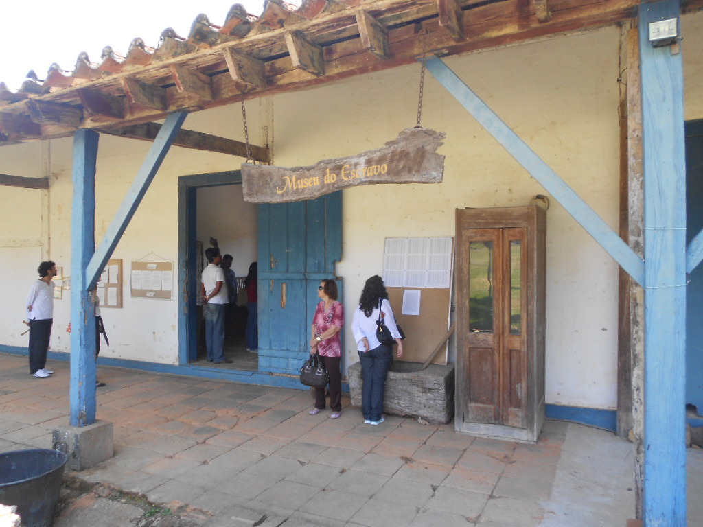 Museu do Escravo, na Fazenda Ponte Alta, em Barra do Piraí, estado do Rio de Janeiro, Brasil.